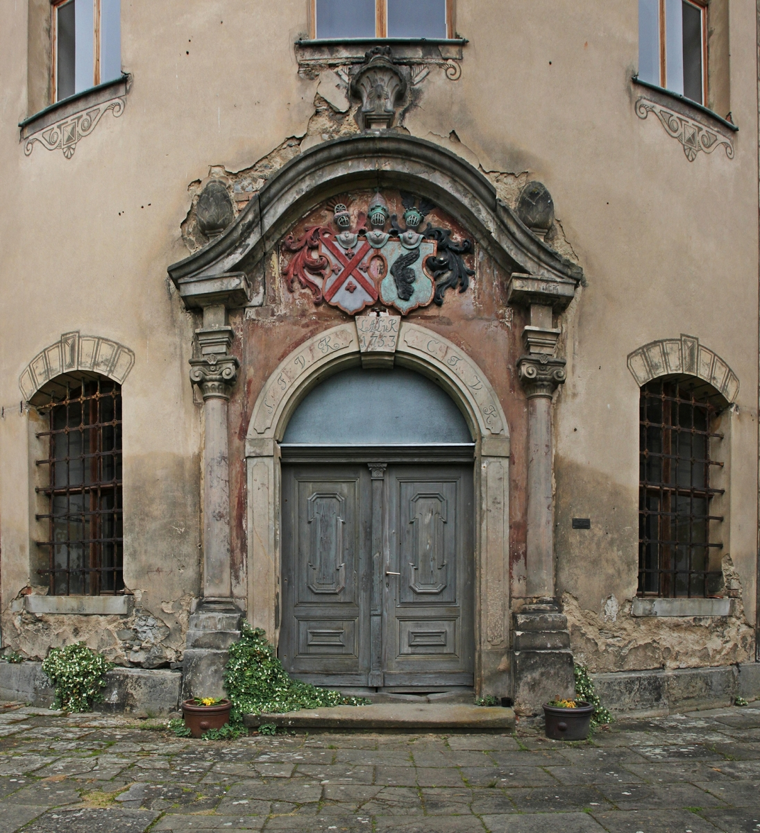 Schloss Hainewalde: Blick auf das Südportal mit dem Doppelwappen der Familien von Kanitz und von Kyaw (Kleine Seite 31, Denkmal-Nr. 09271012, Sachgesamtheits-Nr. 09303345)